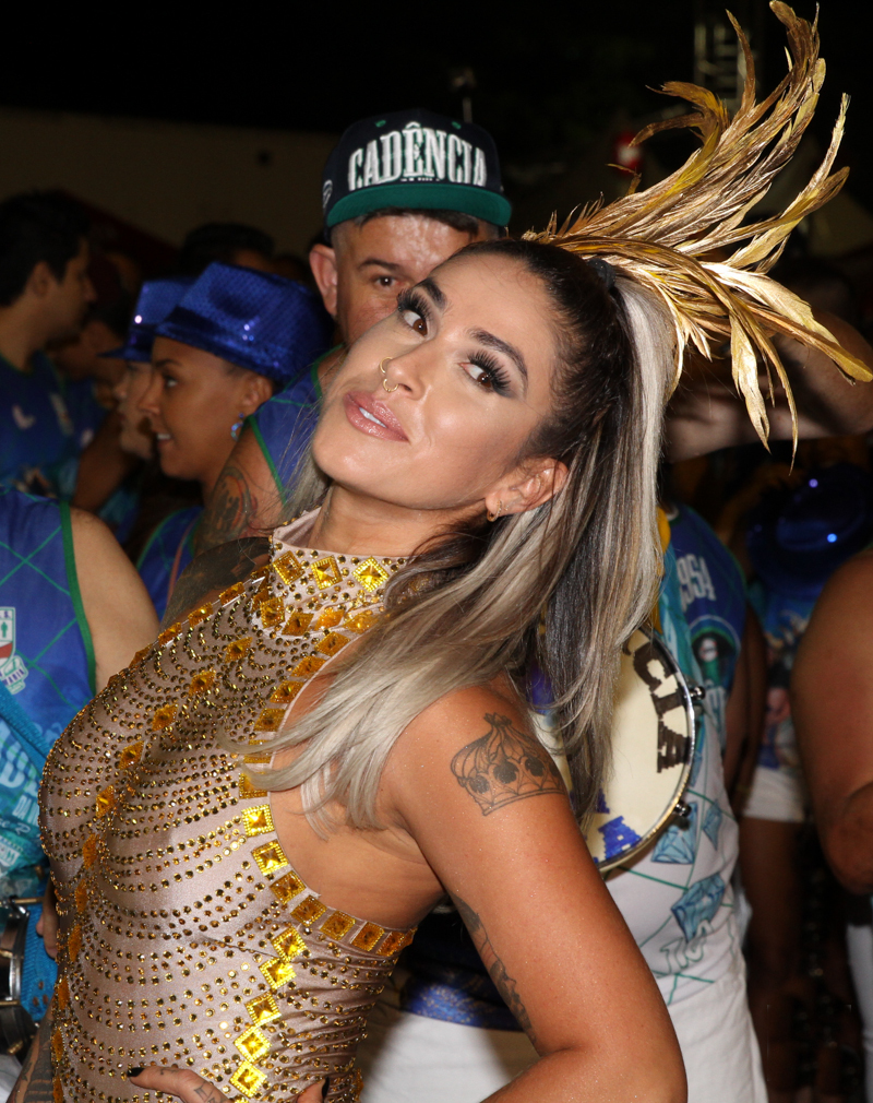 Dani Bolina